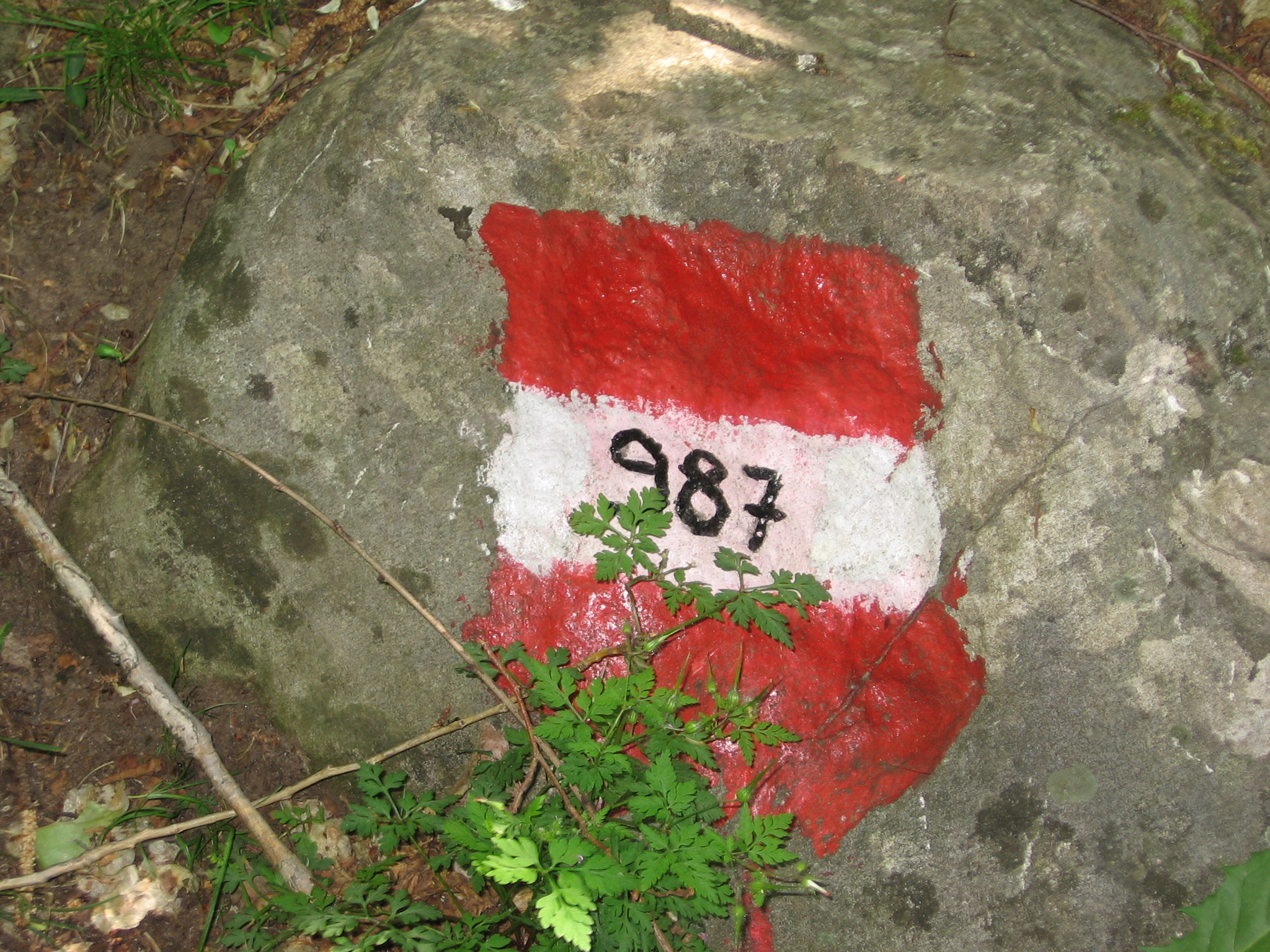 Segnavia CAI